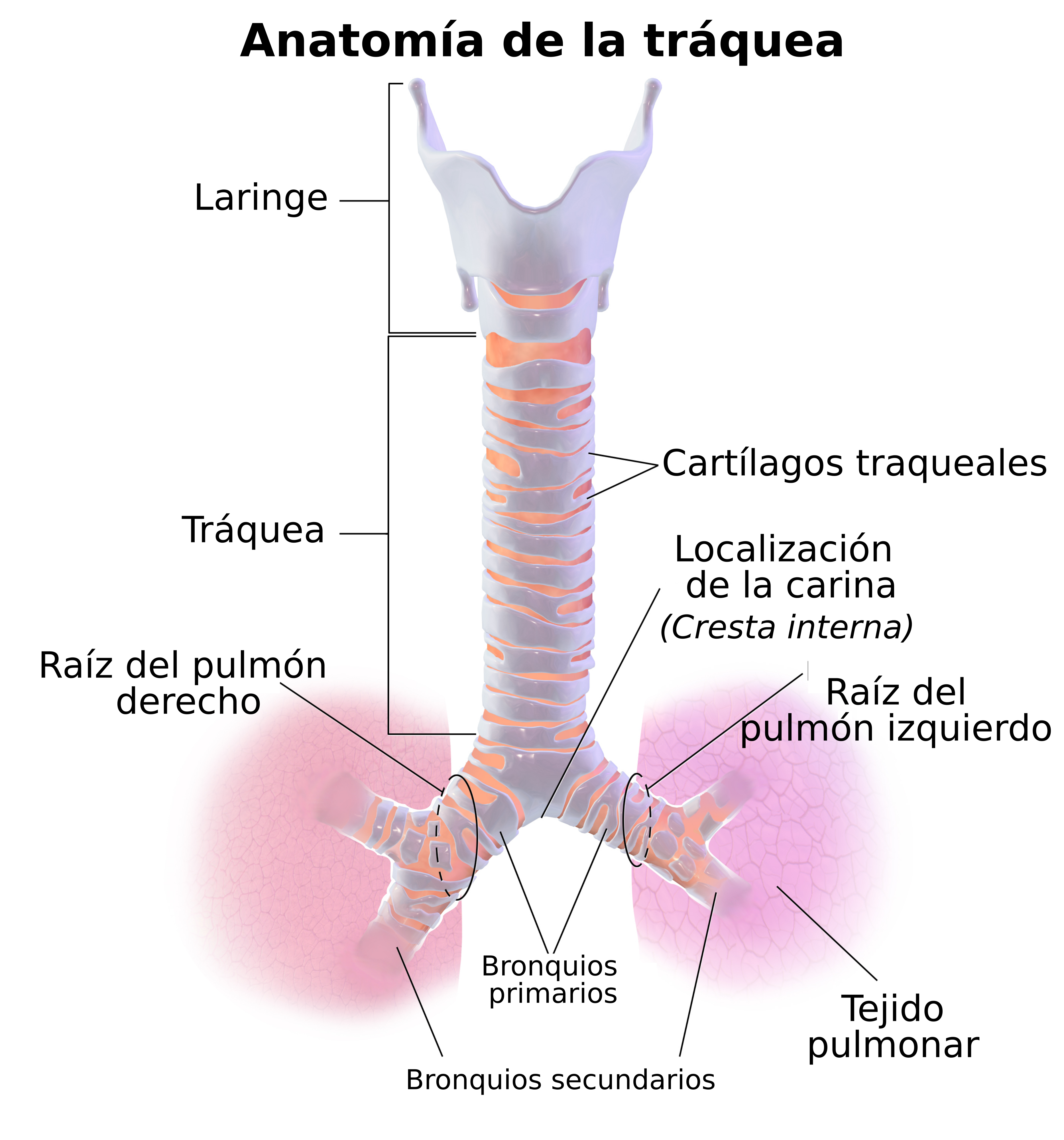 Tráquea. Ver en full animation of this medical topic.